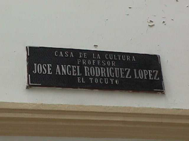 Casa de la Cultura Profesor José Ángel Rodríguez López en El Tocuyo, estado Lara - Venezuela 1999